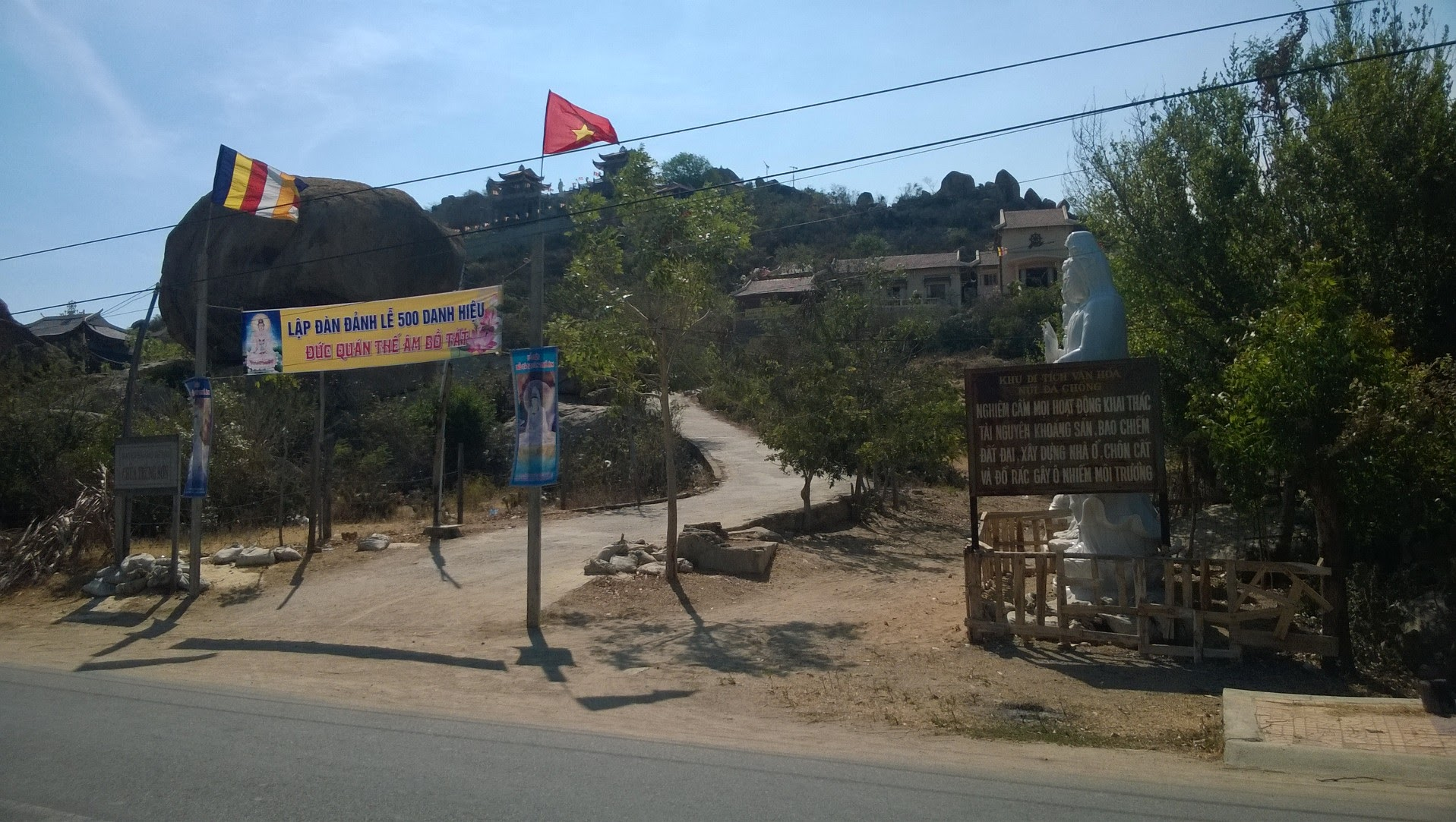 Khu Di tích Văn hóa núi Đá Chồng, Ninh Hải, Ninh Thuận